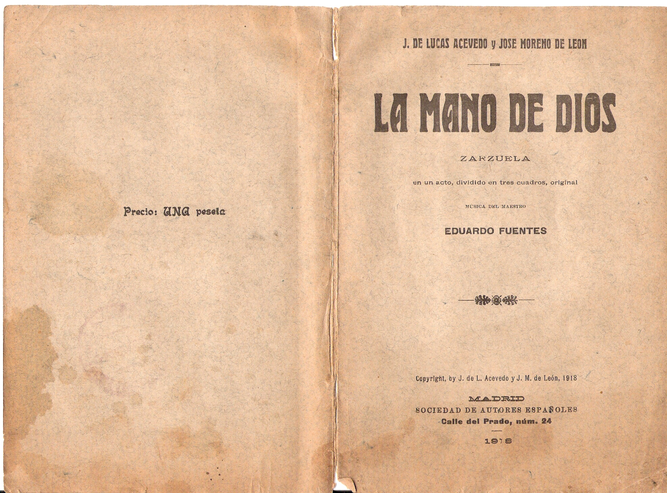 LA MANO DE DIOS. JOSE DE LUCAS ACEVEDO